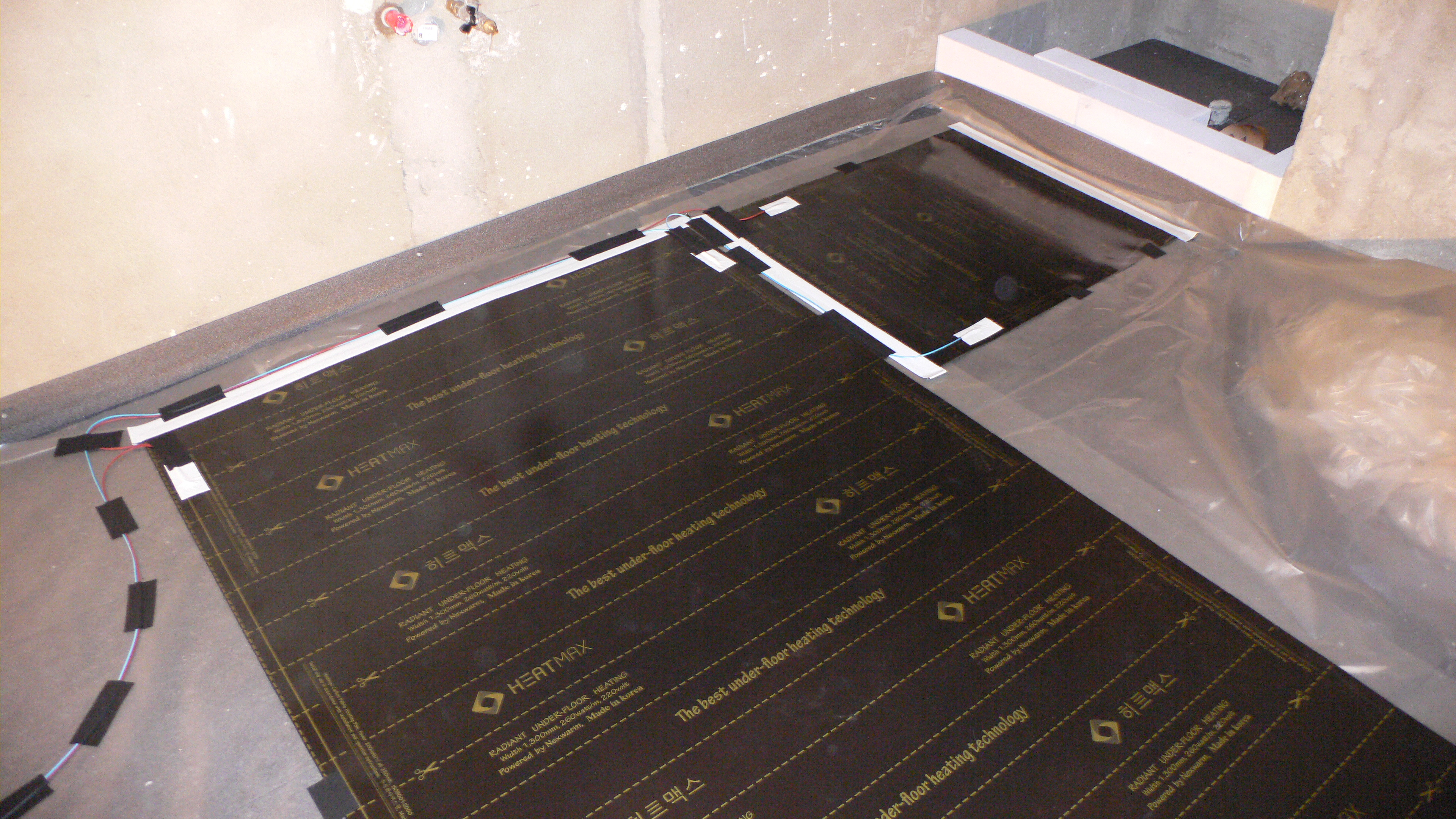 Elektrická topná uhlíková fólie